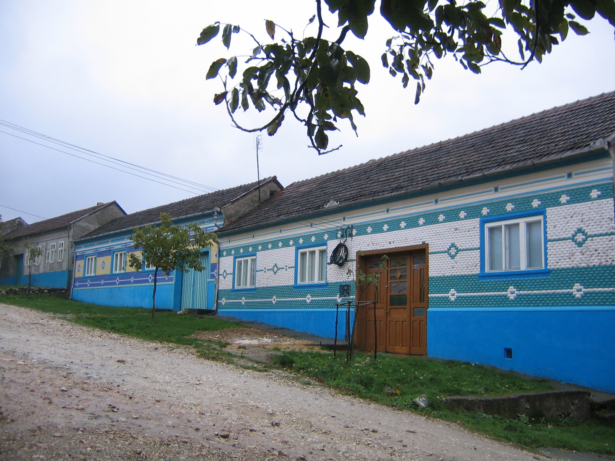 Utcarészlet Szenthelena településen (Erdély)